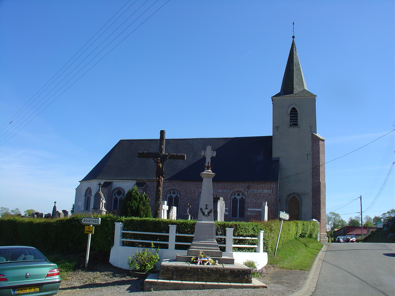 Église de Bécourt